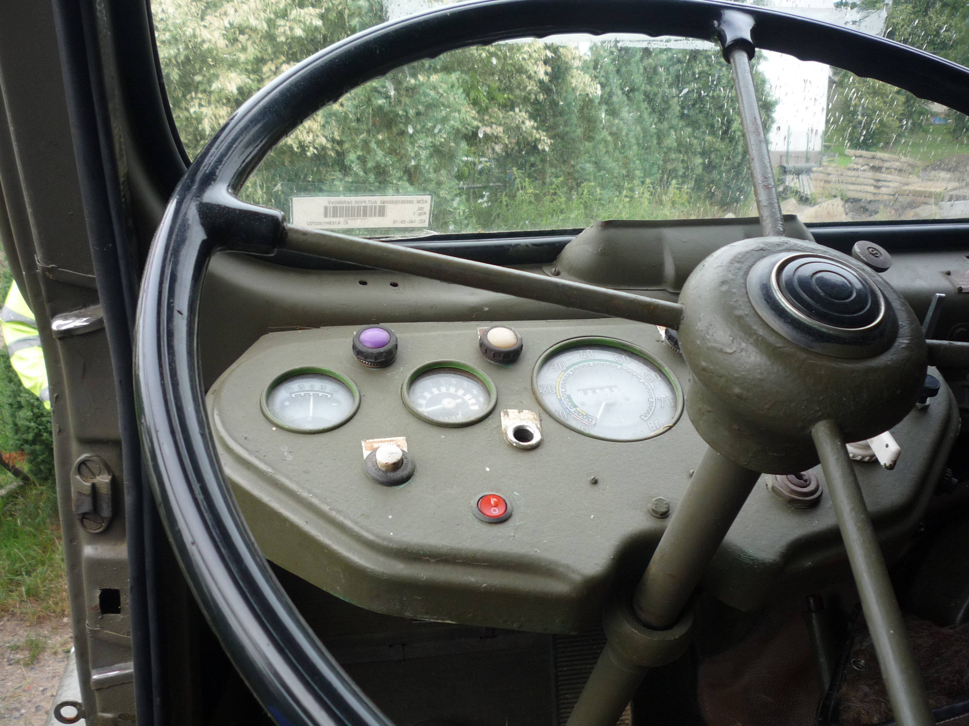 Autor fotografie Jiří Zelenka. Praga V3S - vojenská štábní spojařská verze. Khaki nátěr. Modernizovaná pro vojenské účly 1990 - 2000. Czech Republic.